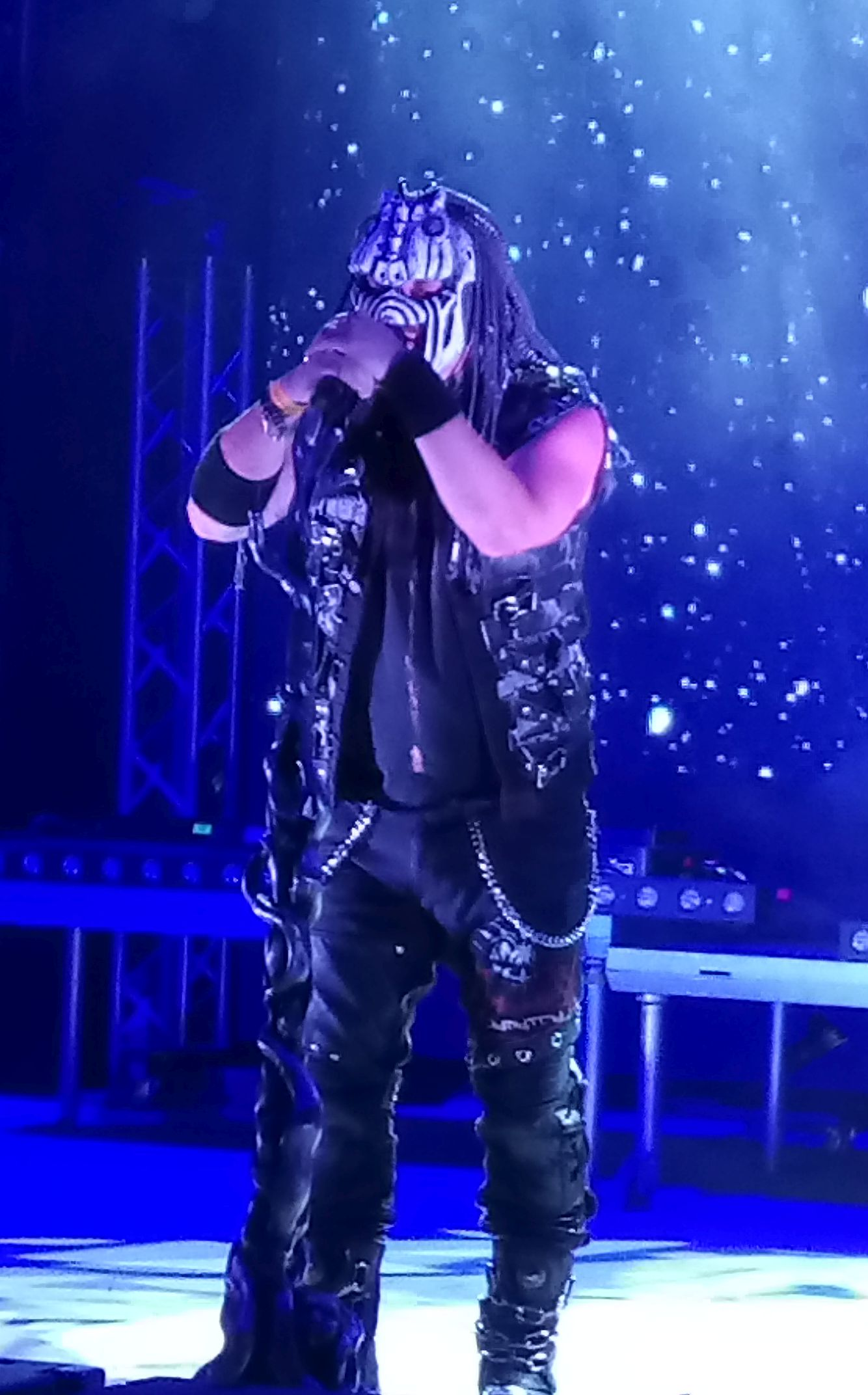 Jan „Protheus“ Macků při koncertu s kapelou Dymytry na Mikulovském pivobraní